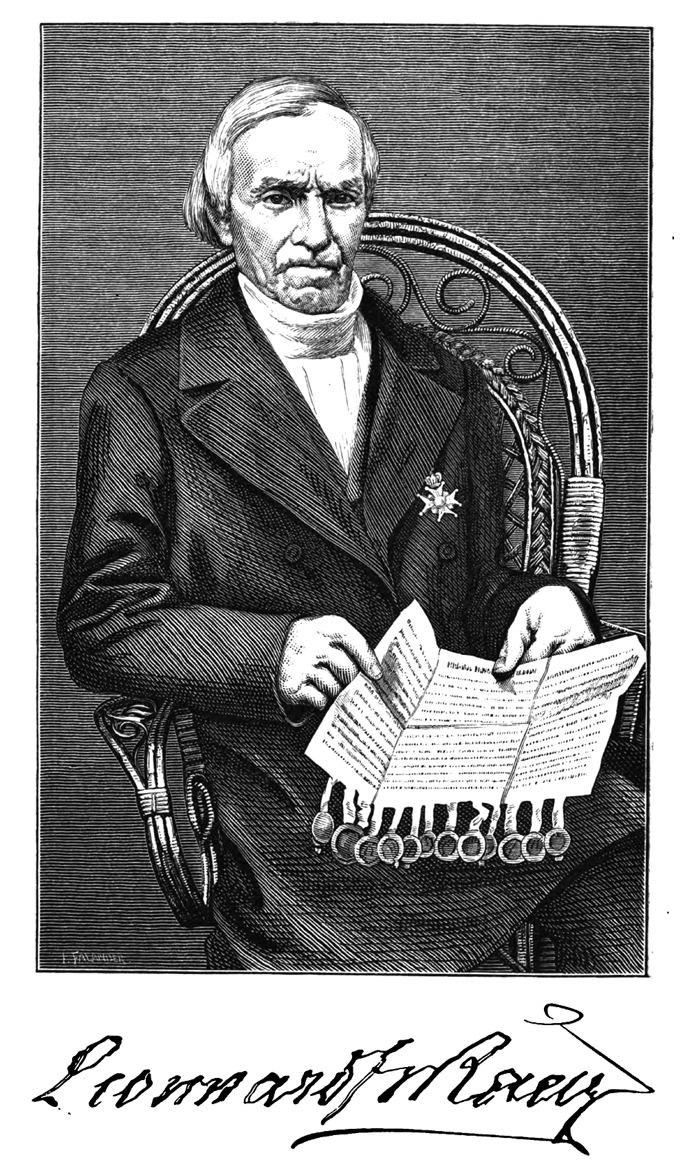 L F Rääf (1786-1872)